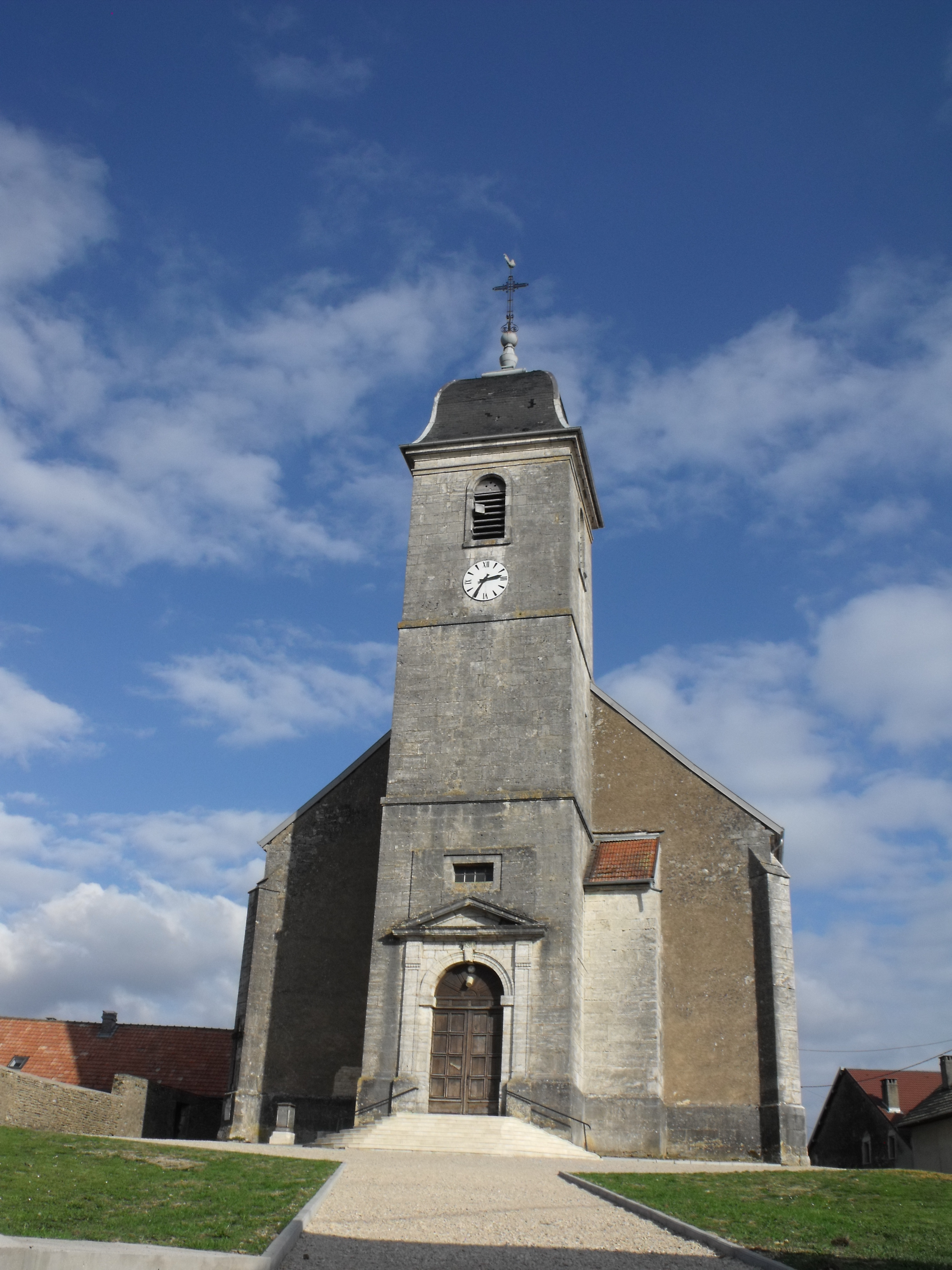 Eglise de Saint-Hilaire, Doubs, France